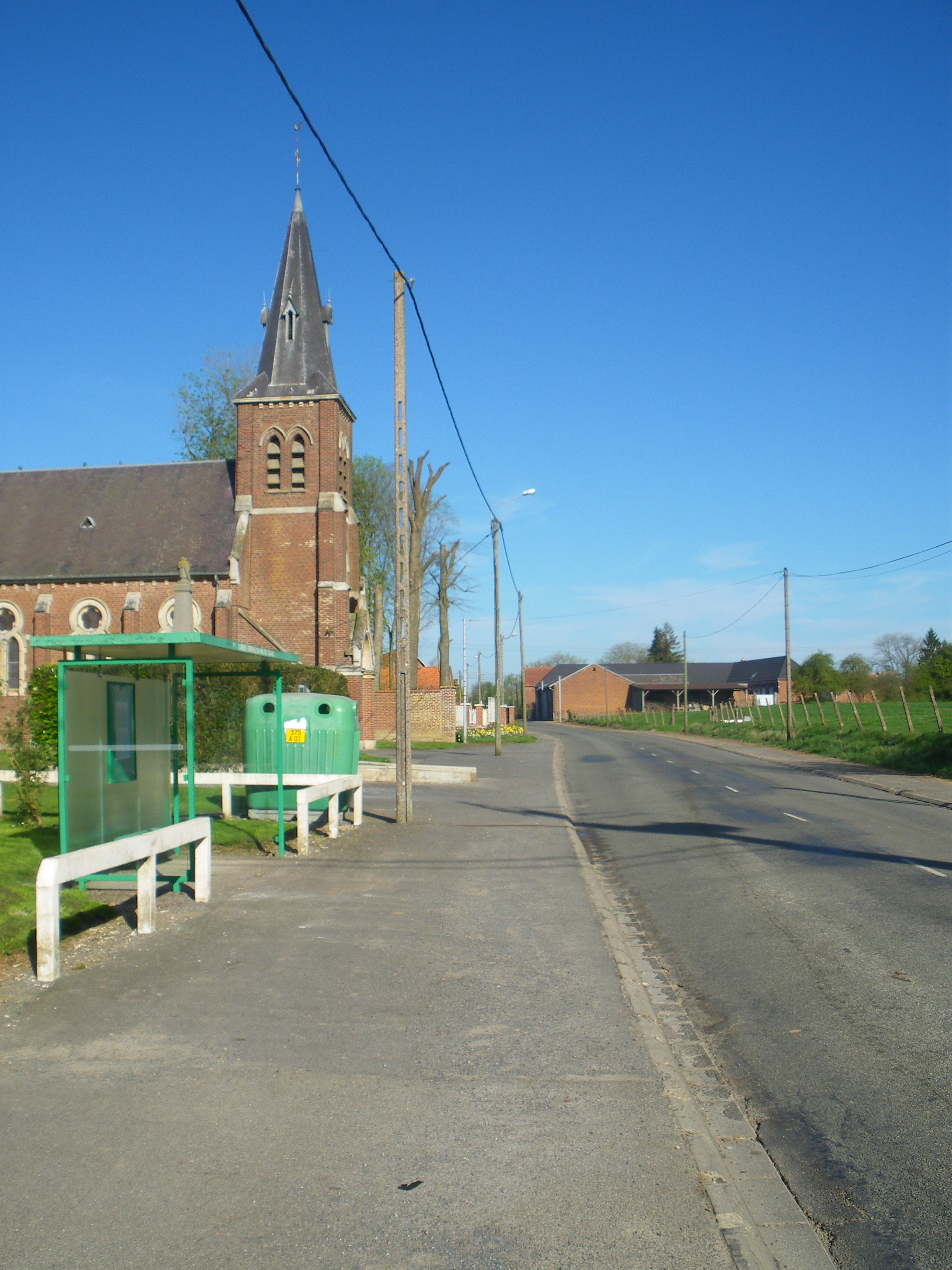 Vue de la rue principale de Gommecourt (62).